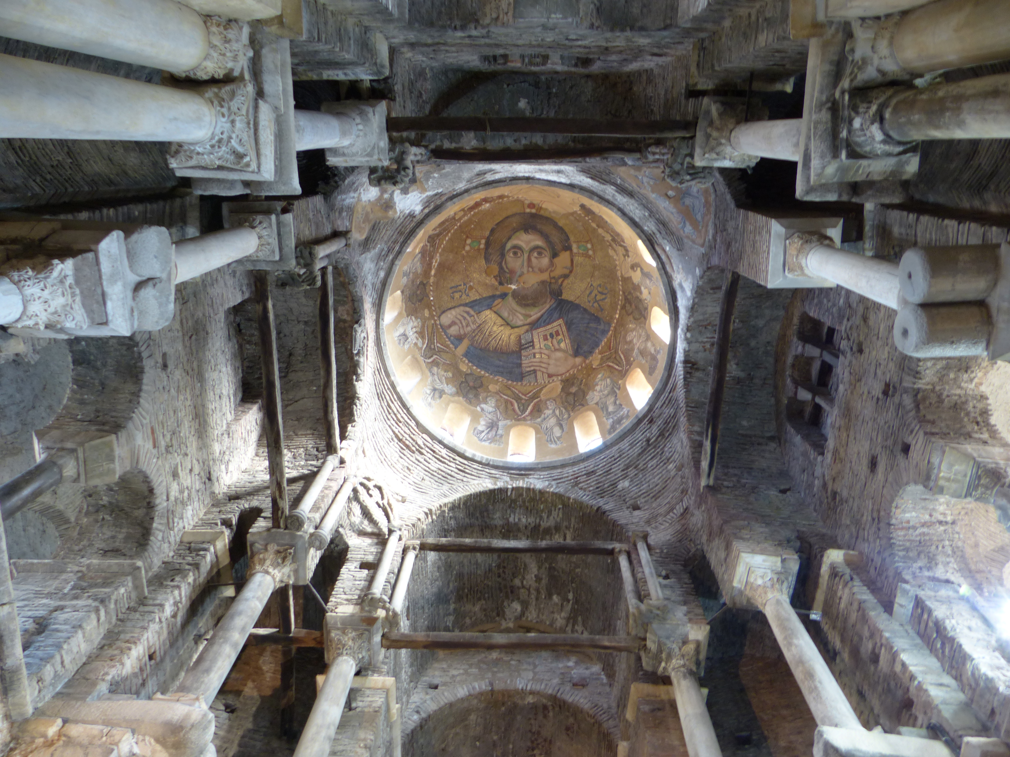 Coupole et Pantocrator de l'église Panaghia Parigoritissa à Arta (Épire)